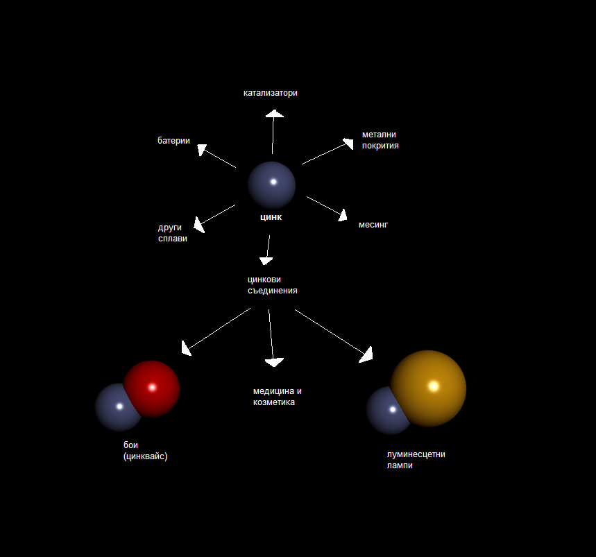 Приложение на цинка